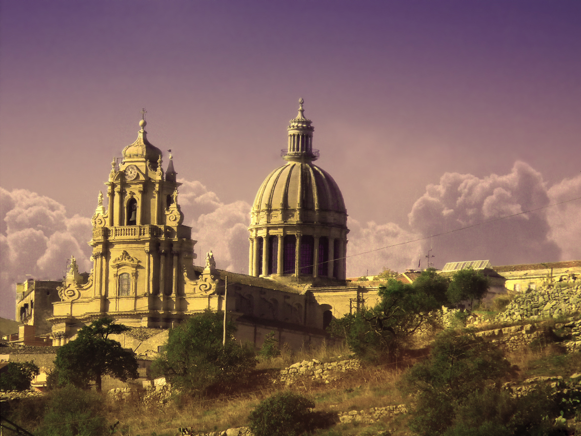 Chiesa di San Giorgio a Ragusa Ibla, scattata da Giorgio Leggio